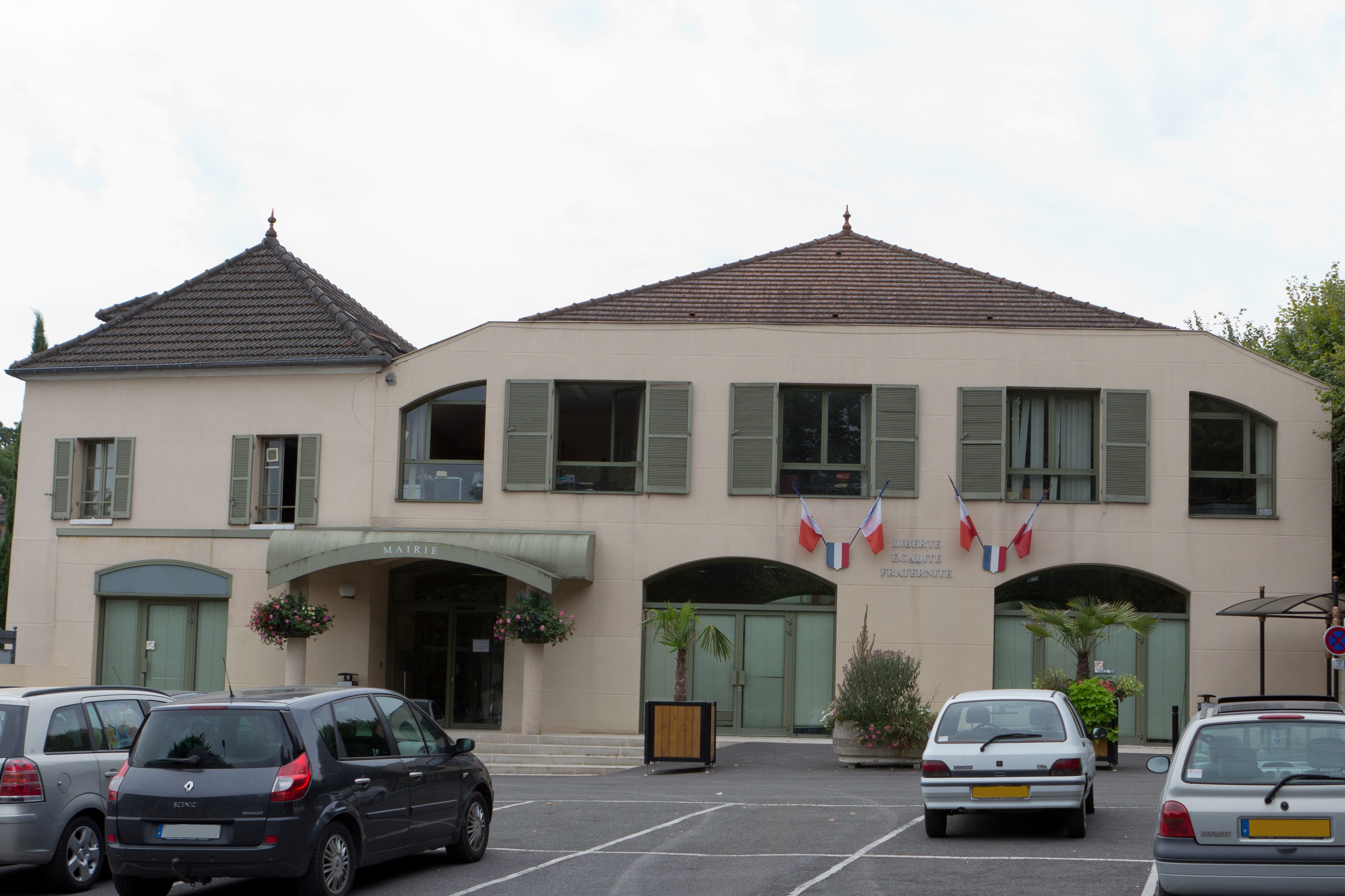 Mairie de Fleury-Mérogis, commune de Fleury-Mérogis, département de l'Essonne. France.